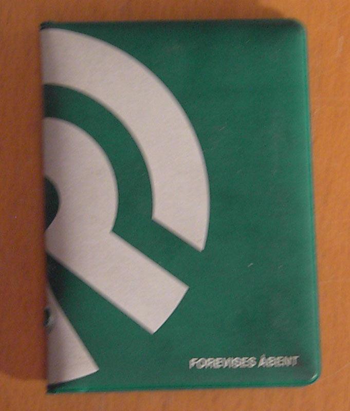 Et lukket togkort, som det normalt beskues og opbevares. Hylsteret er udstedt af det nu nedlagte Ribe Amts Trafikselskab.